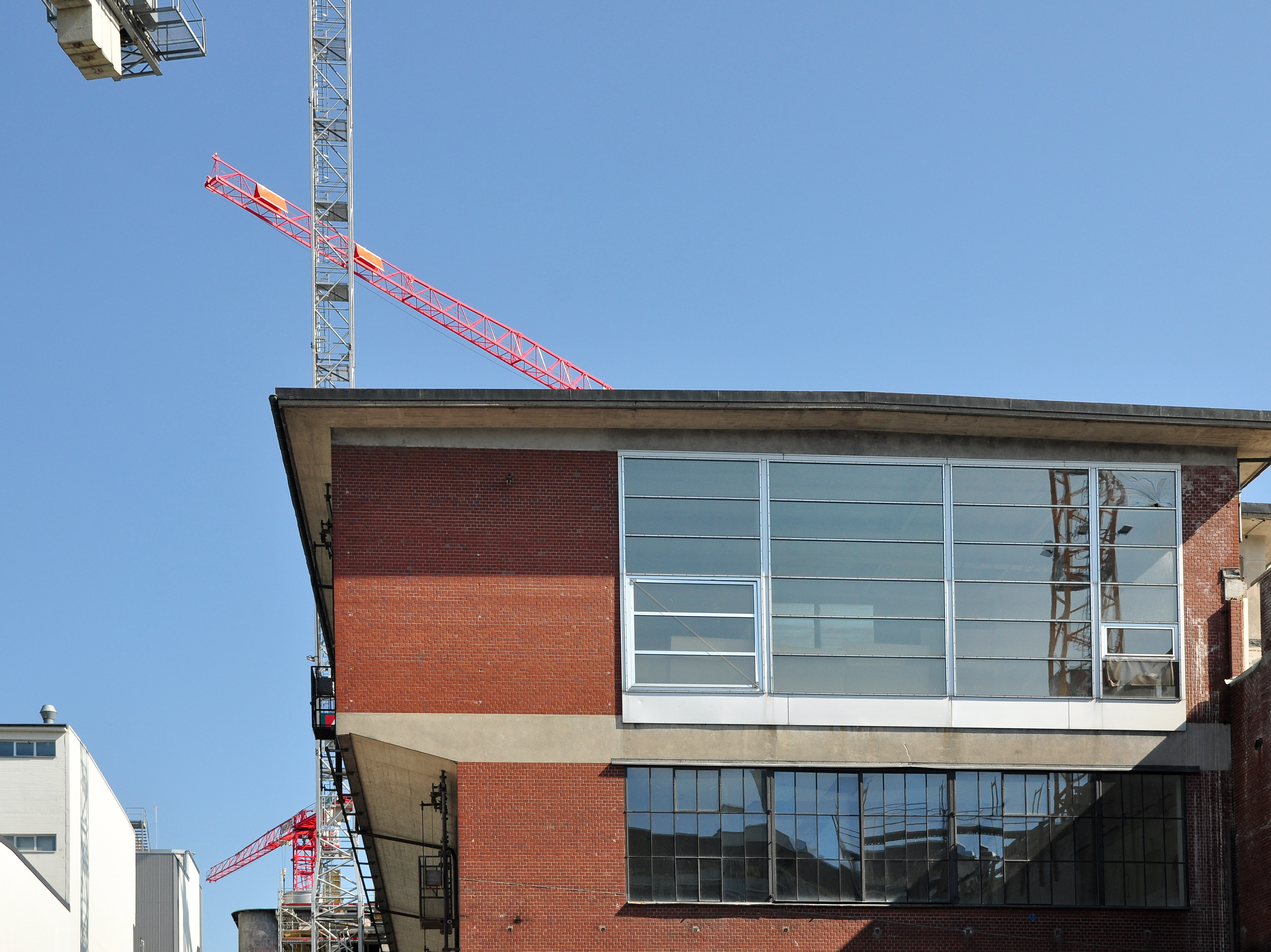 Migros Museum für Gegenwartskunst, Löwenbräu-Areal, Limmatstrasse 270 in Zürich-Escher Wyss (Switzerland)